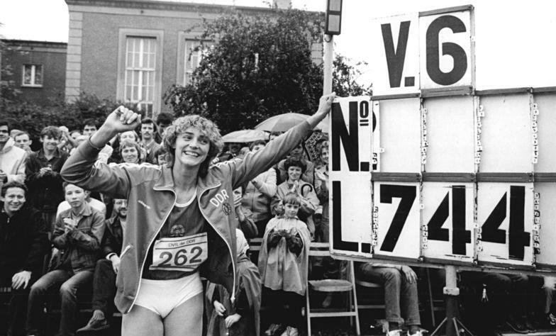 Heike Drechsler ADN-ZB Koard 22.9.85 Berlin: Leichtathletik-Sportfest. Weitsprung-Weltmeisterin Heike Drechsler (SC Motor Jena) freut sich über ihren Weltrekord beim Weitsprung von 7.44 m. Sie errang diesen Erfolg beim Wettbewerb der besten Leichtathleten der DDR im Berliner Sportforum. (siehe 16N)